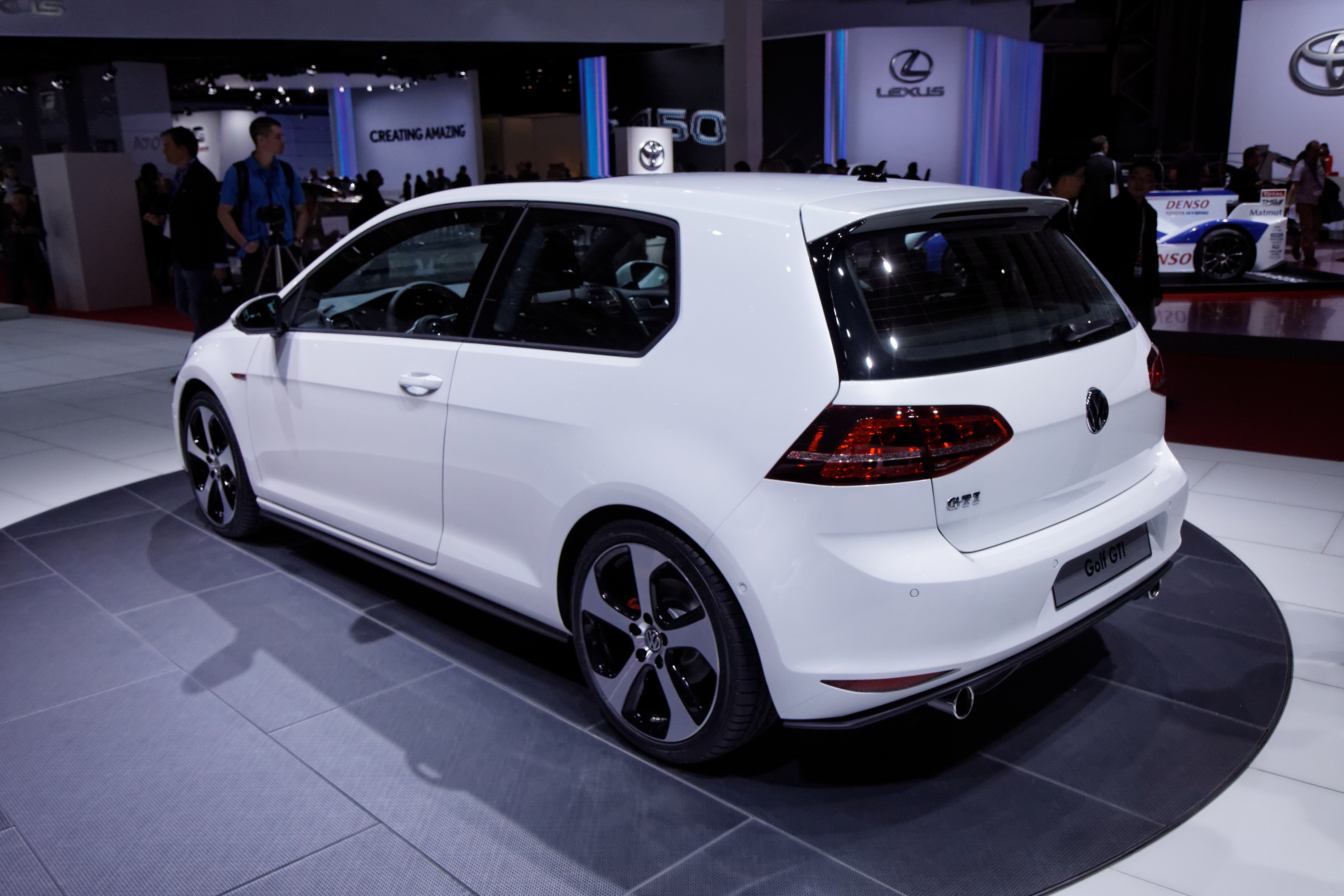 Une Volkswagen Golf présentée lors du Mondial de l'Automobile de Paris 2012.